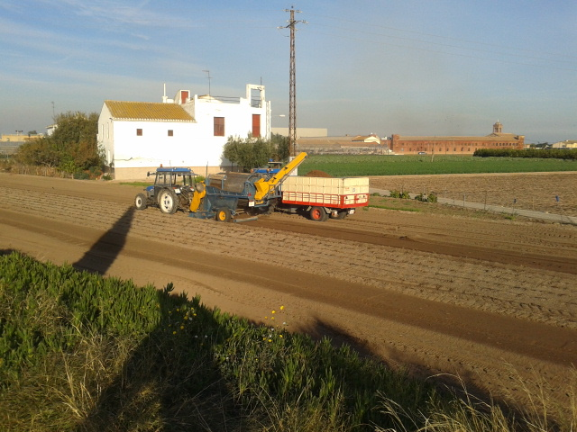 Recollint la xufa a Meliana